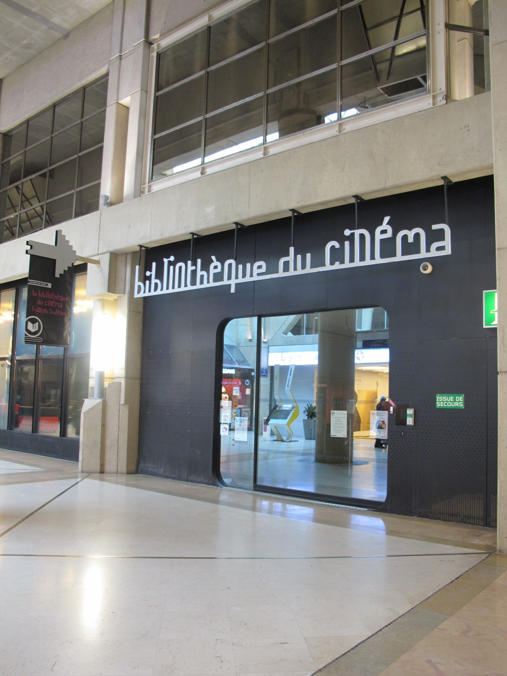 Bibliothèque de cinéma François-Truffaut, Forum des Halles, Paris - entrée